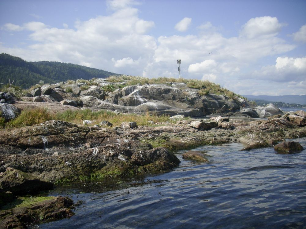 Kattholmane bærer preg av sjøfuglenes bruk gjennom mange år.